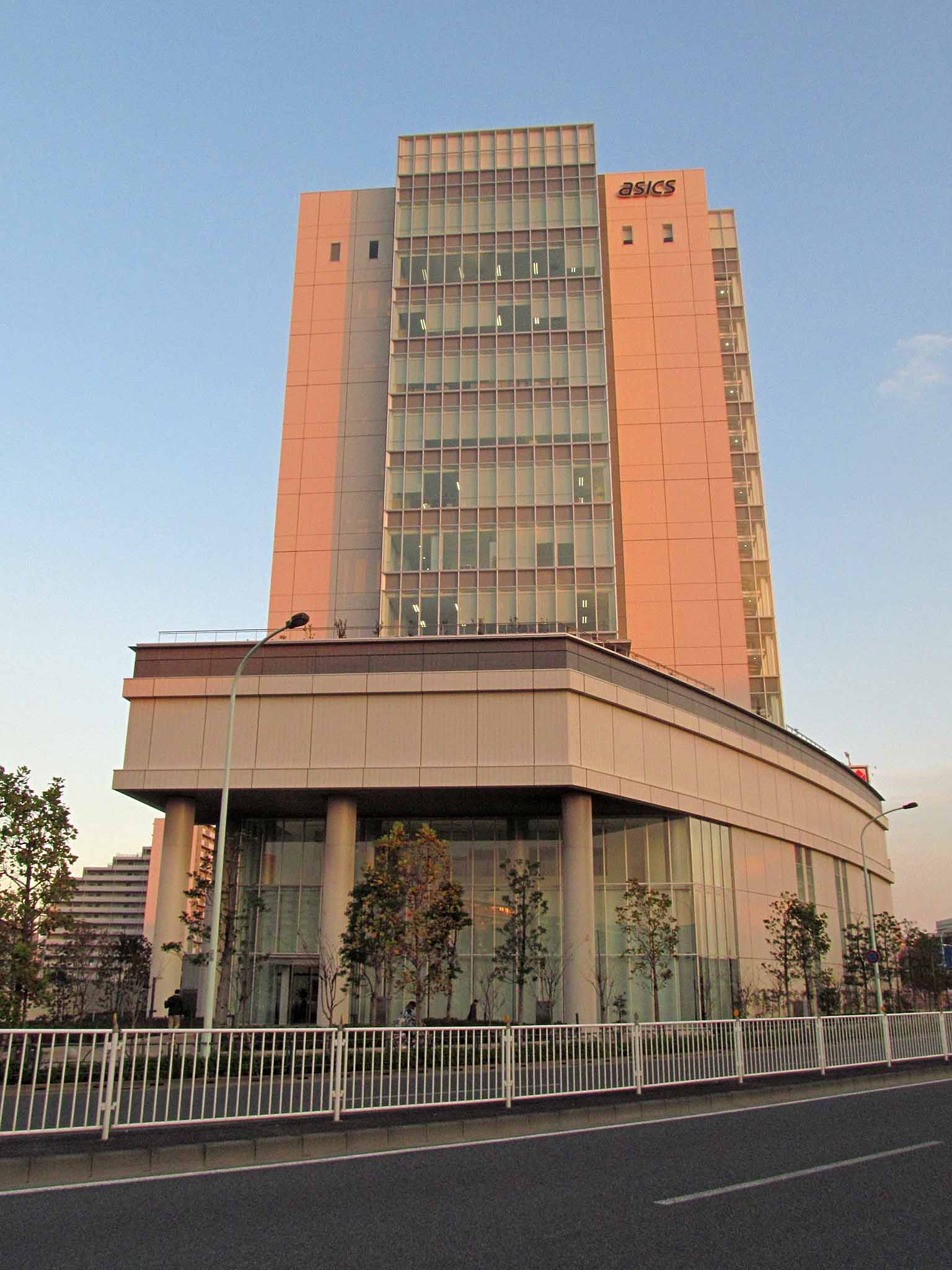 江東区新砂のアシックスジャパンとアシックス販売の本社。2013年に竣工し、錦糸町から八丁堀を経て移転した。ニシ・スポーツの本社も入居する。